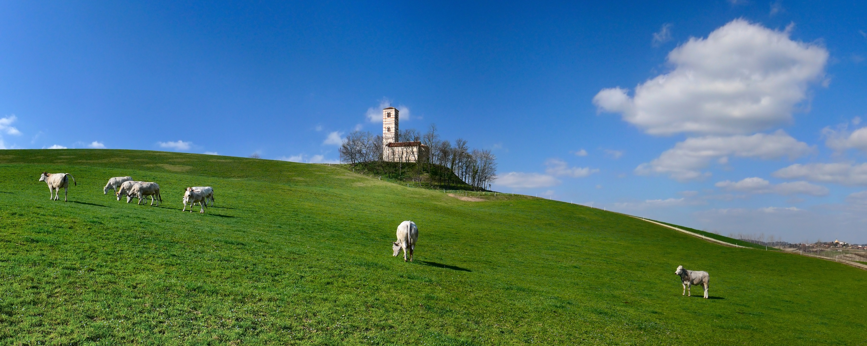 Chiesa dei SS. Nazario e Celso This is a photo of a monument which is part of cultural heritage of Italy.